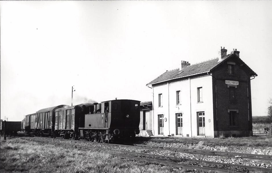 La gare d'Hervilly-Montigny reconstruite vers 1925.